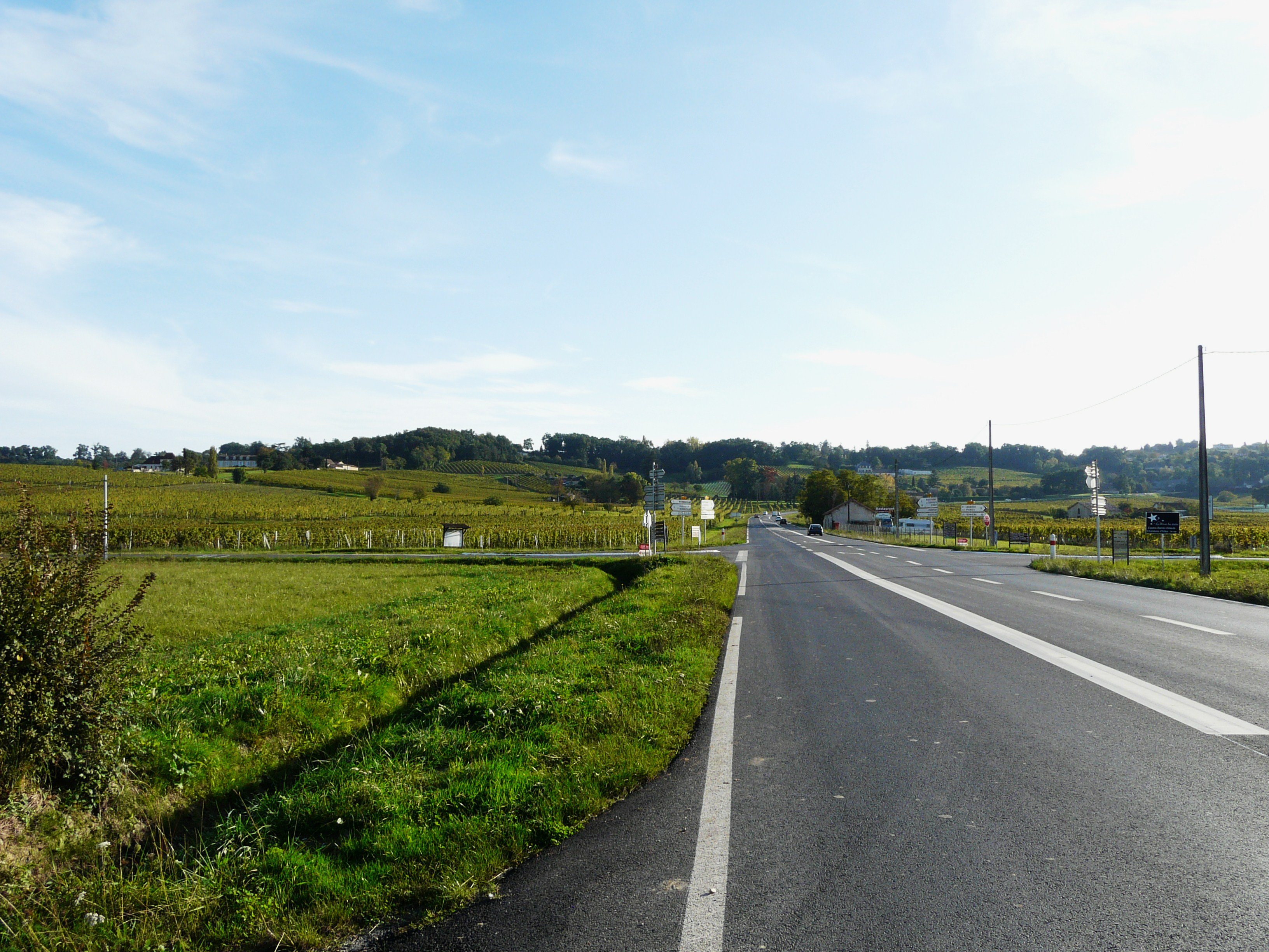 La route départementale 933 (ancienne route nationale 133), à son intersection avec la route départementale 14, Monbazillac, Dordogne, France. Vue prise en direction du sud, vers les coteaux de Monbazillac.